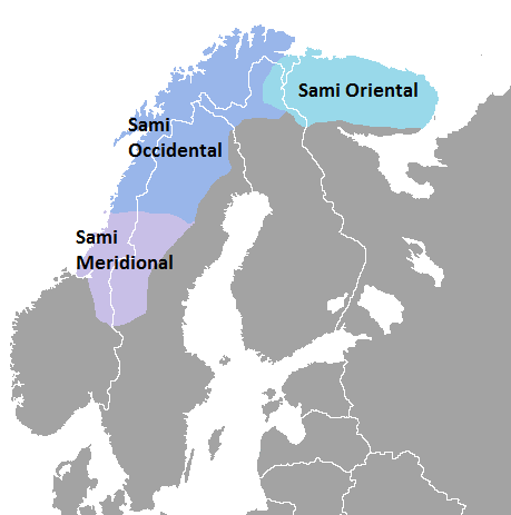 Lenguas sami.